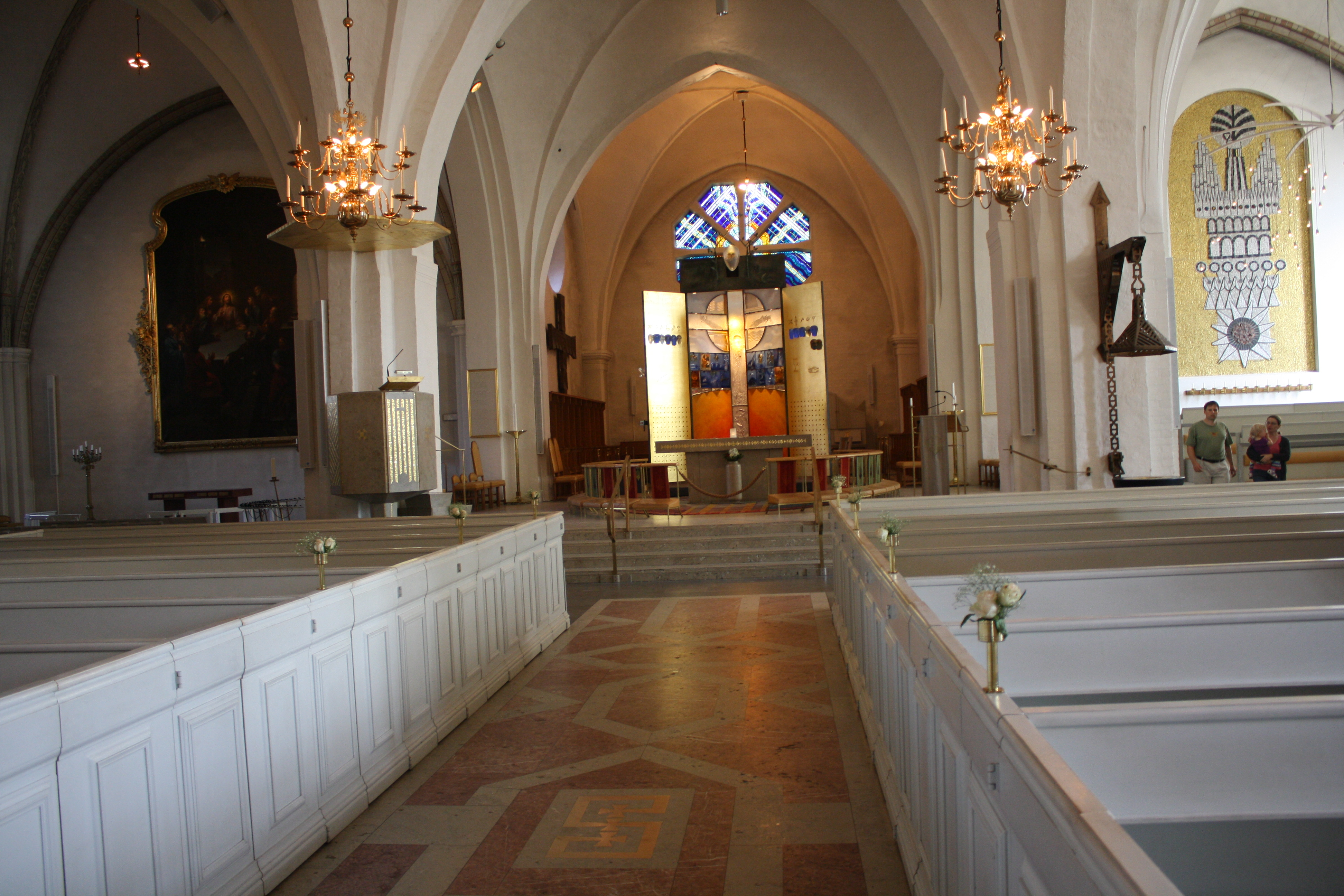 Вид на алтарь, находящийся в конце зала напротив главного входа.